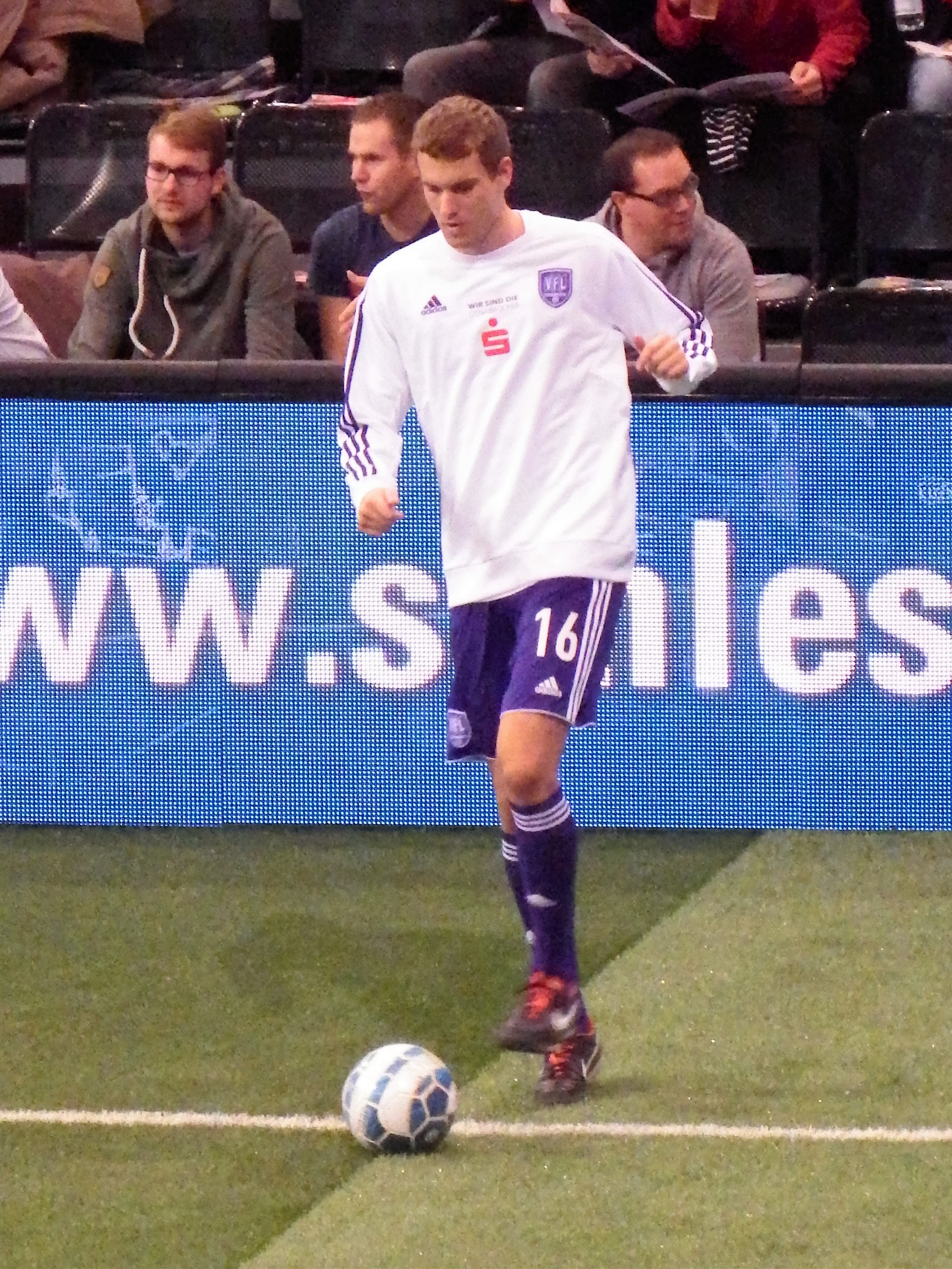 Eiter, Nicolas Osnabrück